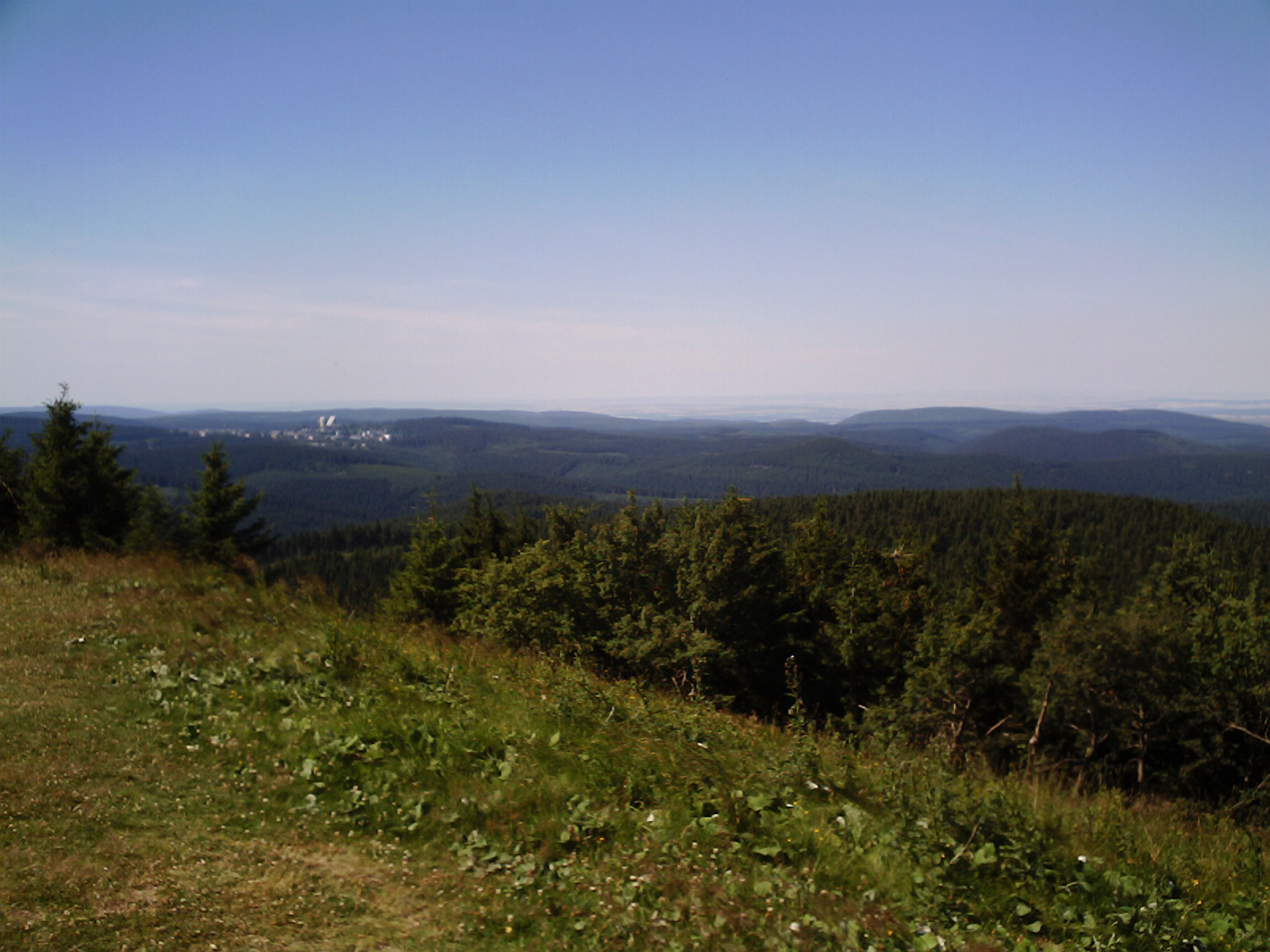 vom Schneekopf nach Oberhof